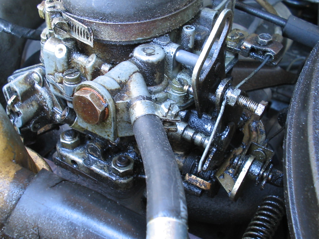 Carburator (2cv/Acadiane)